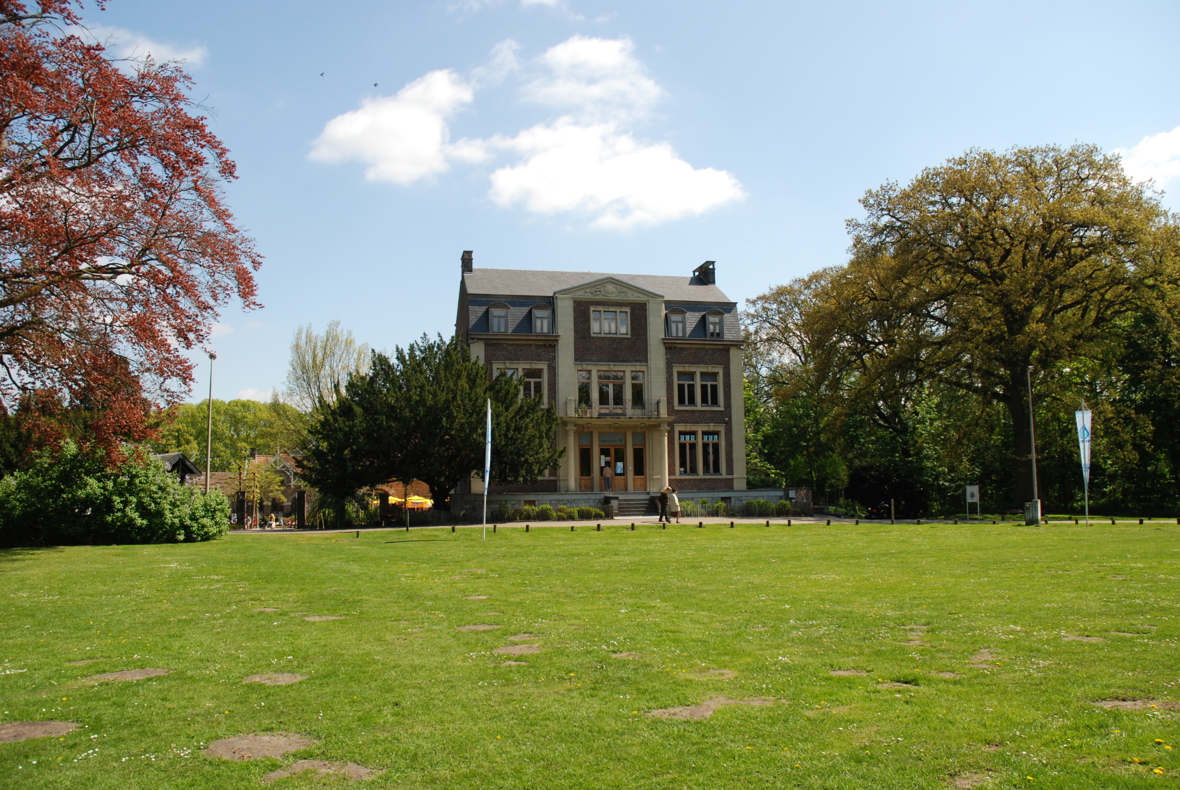 Het herenhuis van het natuurdomein Kiewit te Hasselt, België